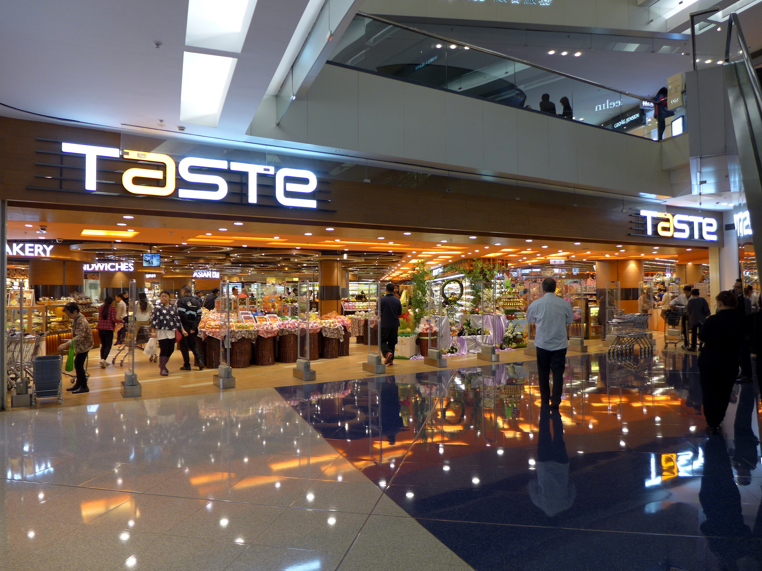 Taste Supermarket in Festival Walk